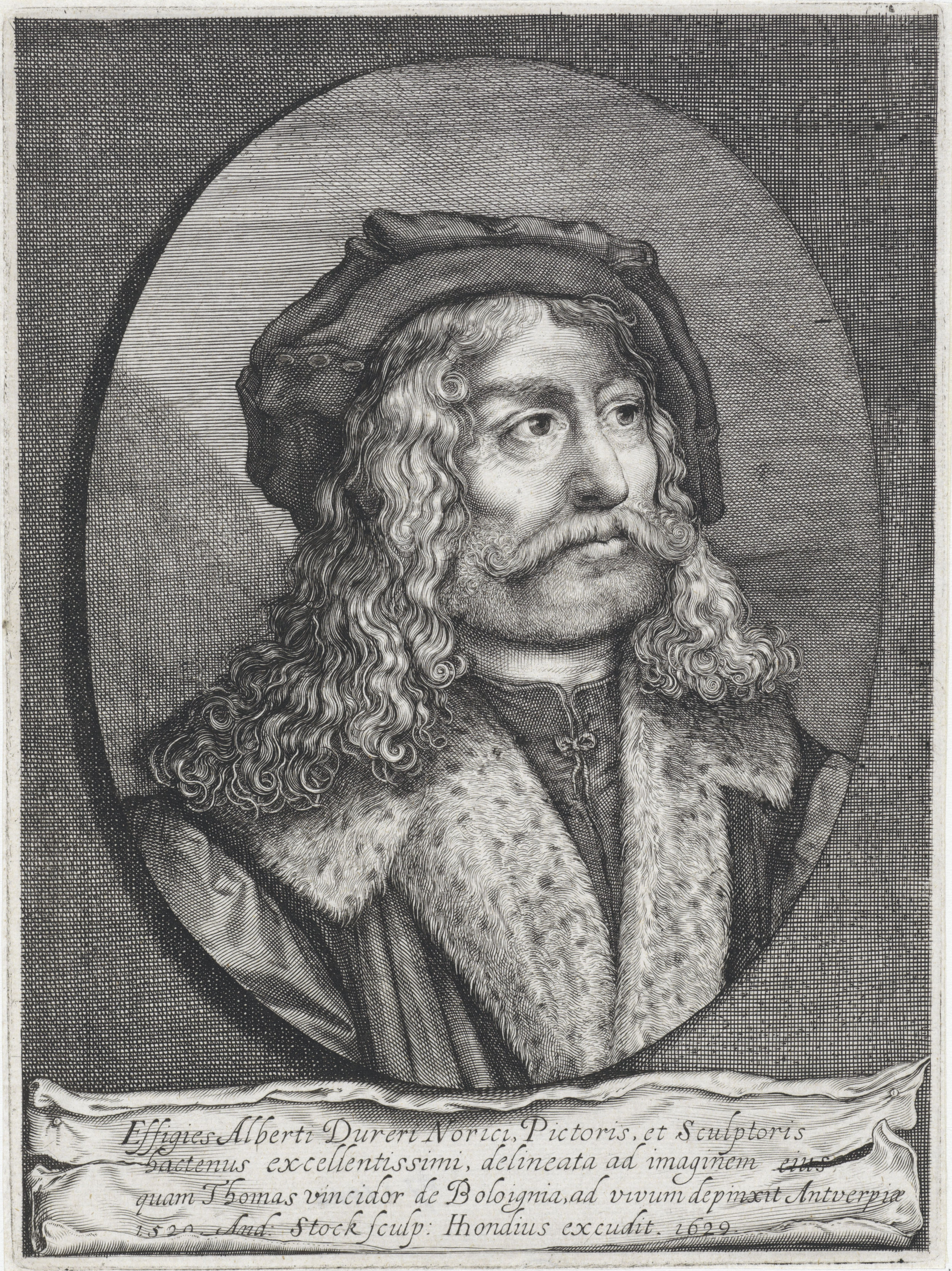 IdentificatieTitel(s): Portret van Albrecht DürerObjecttype: prent Objectnummer: RP-P-1967-1010Catalogusreferentie: Hollstein Dutch 18-1(2)Opschriften / Merken: verzamelaarsmerk, verso, gestempeld: Lugt 2228Omschrijving: Portret van de schilder en prentmaker Albrecht Dürer met een baret op het hoofd. Onder het portret een vierregelige tekst in het Latijn.VervaardigingVervaardiger: prentmaker: Andries Jacobsz. Stock (vermeld op object)naar tekening van: Tommaso da Bologna (vermeld op object)uitgever: Hendrick Hondius (I) (vermeld op object)Plaats vervaardiging: Den HaagDatering: 1629Fysieke kenmerken: gravureMateriaal: papier Techniek: graveren (drukprocedé)Afmetingen: plaatrand: h 223 mm × b 165 mmOnderwerpWat: portrait, self-portrait of painterportrait, self-portrait of graphic artistWie: Albrecht DürerVerwerving en rechtenCredit line: Aankoop uit het F.G. Waller-FondsVerwerving: aankoop 1967Copyright: Publiek domein